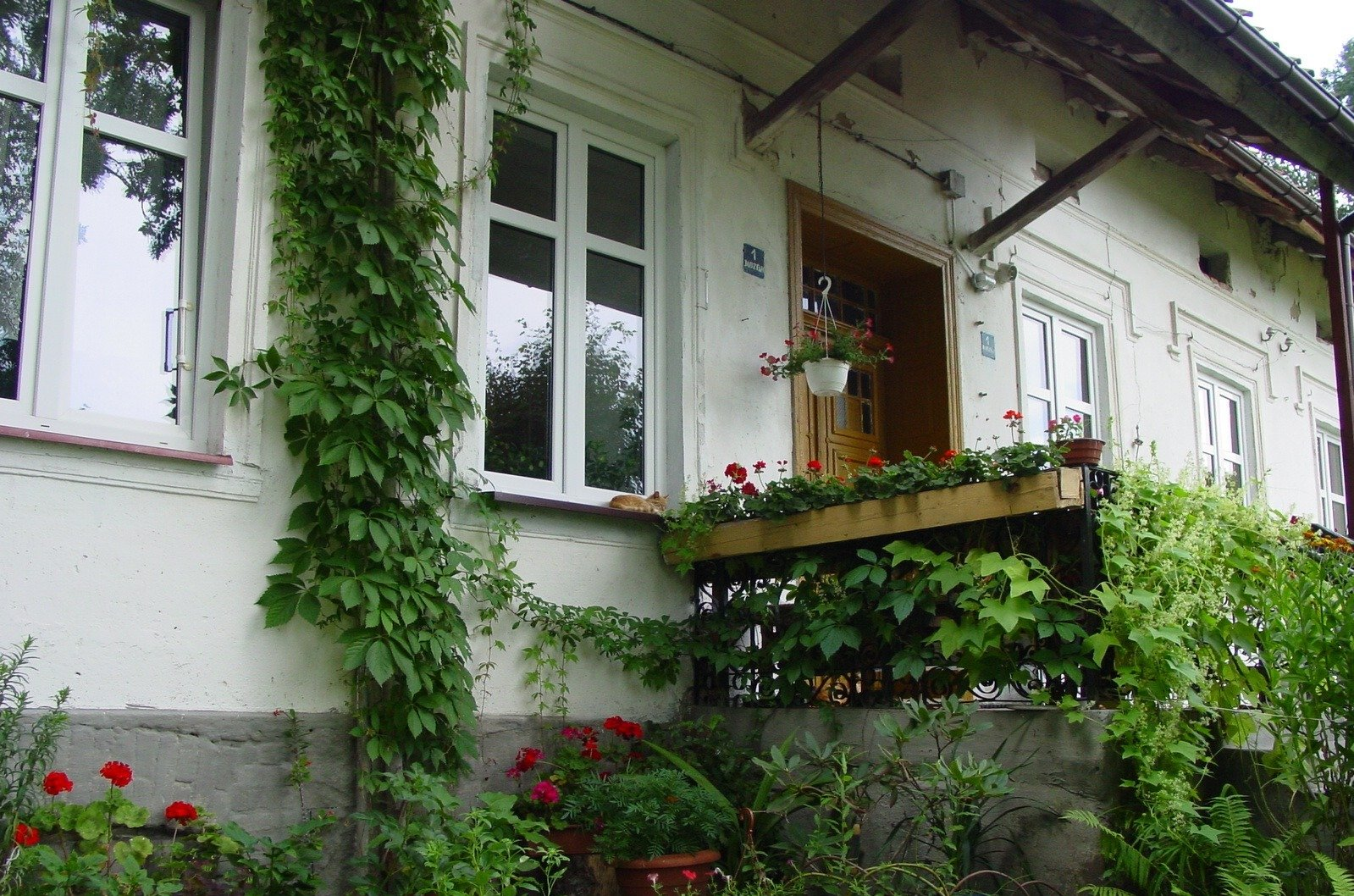 w Budzewie